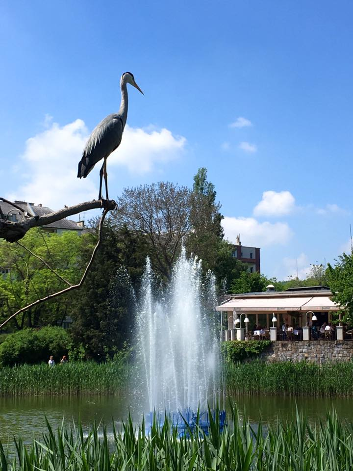 A Feneketlen-tónál megtelepedett szürke gém (Budapest, XI. ker.)